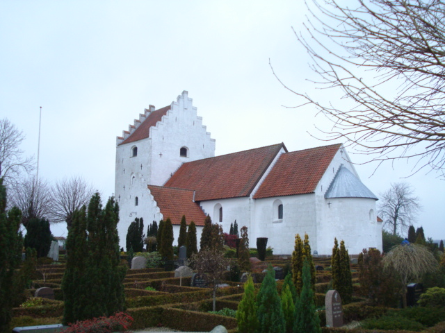 Falling Kirke / Falling Church, Jutland, Denmark